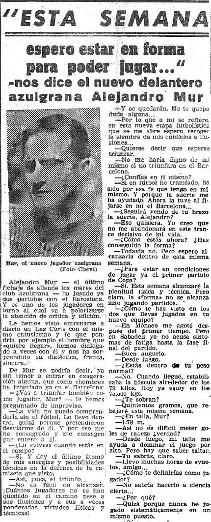 Extracto de una entrevista a Alejandro Mur, nuevo futbolista de FC Barcelona